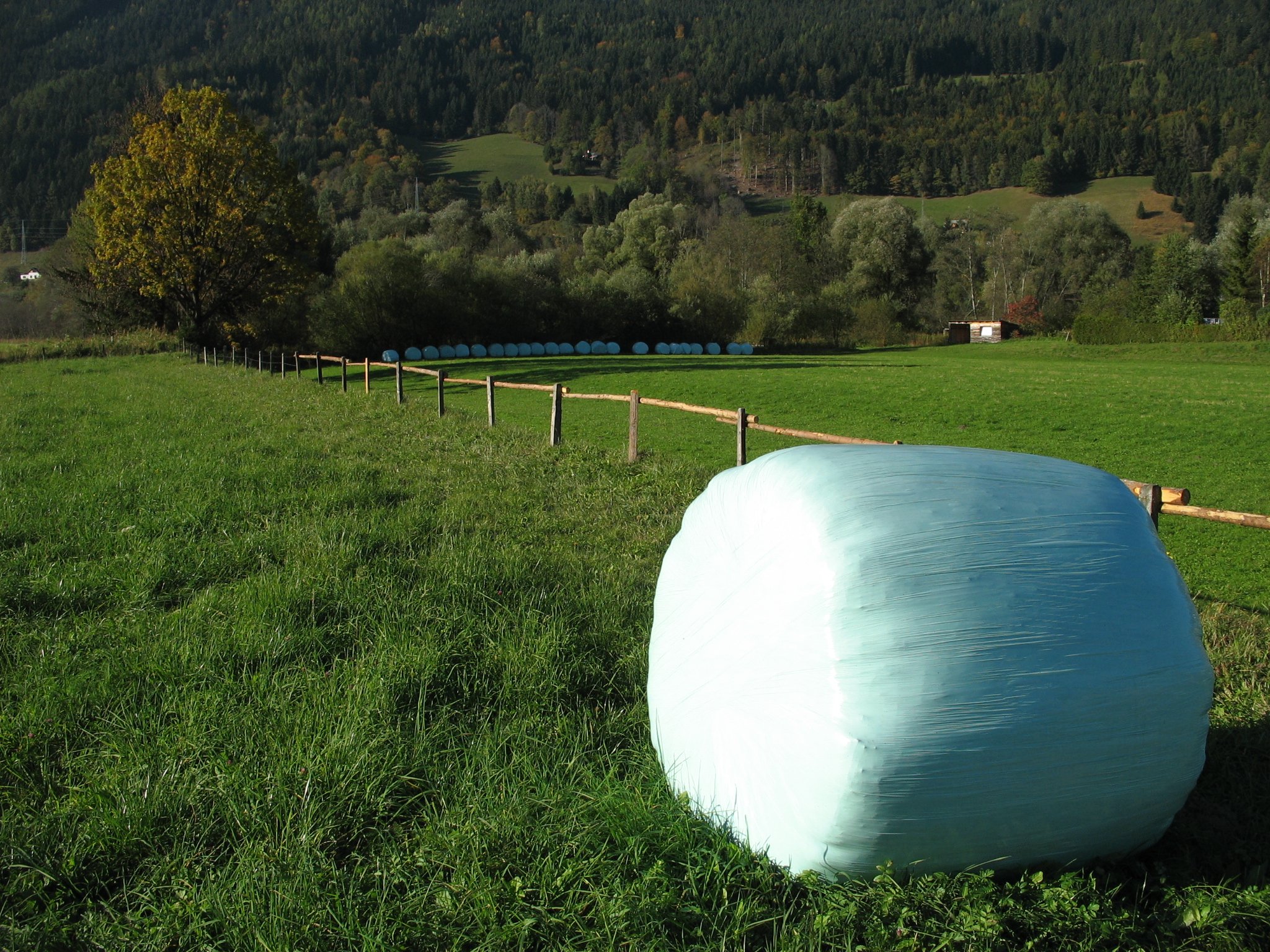 In Plastik verpacktes Heu, Silageballen, Steiermark